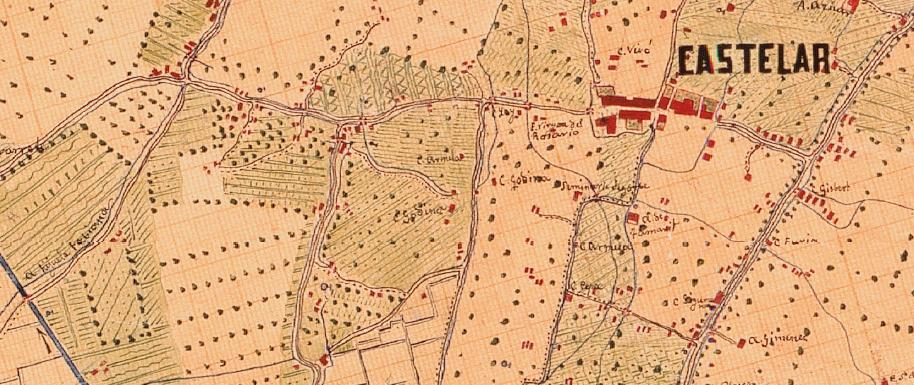 Castellar-L'Oliveral el 1883 (el nord està a la dreta).